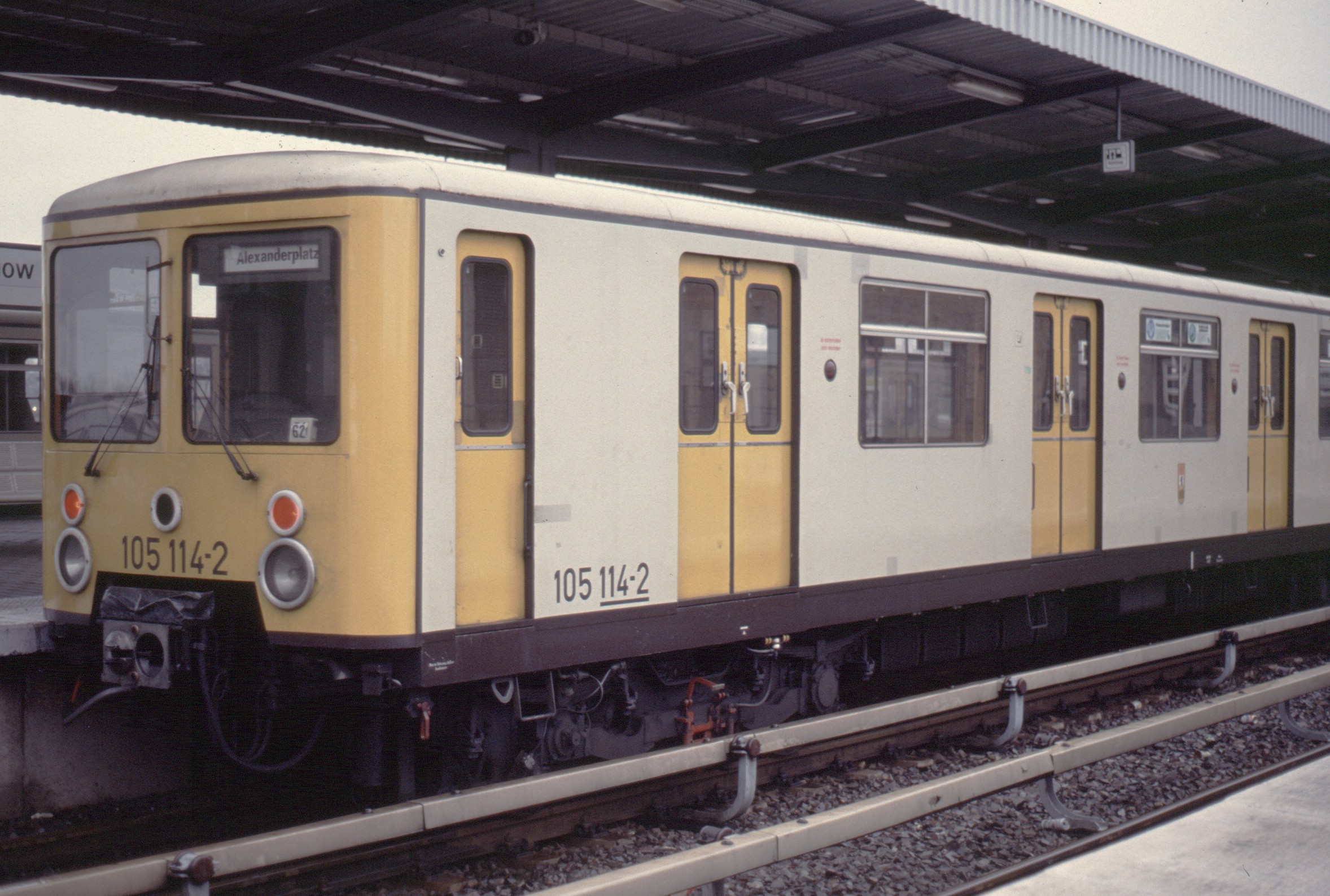 EIII 5. Bauserie in Hönow